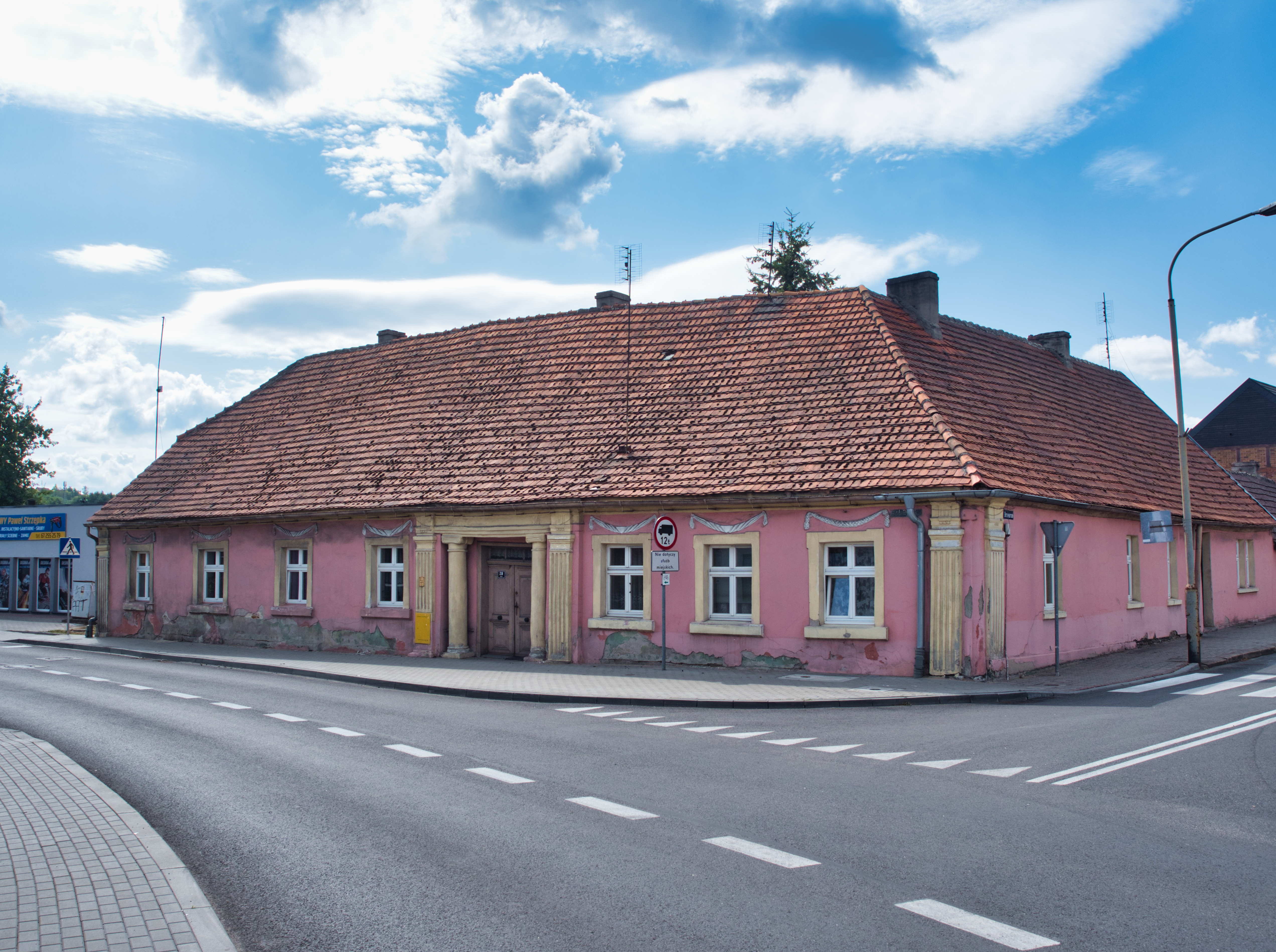 Zabytkowy dworek przy ulicy Rybaki 28 w Czarnkowie. Zabytkek nieruchomy wpisany do rejestru zabytków województwa wielkopolskiego pod numerem 429/A.